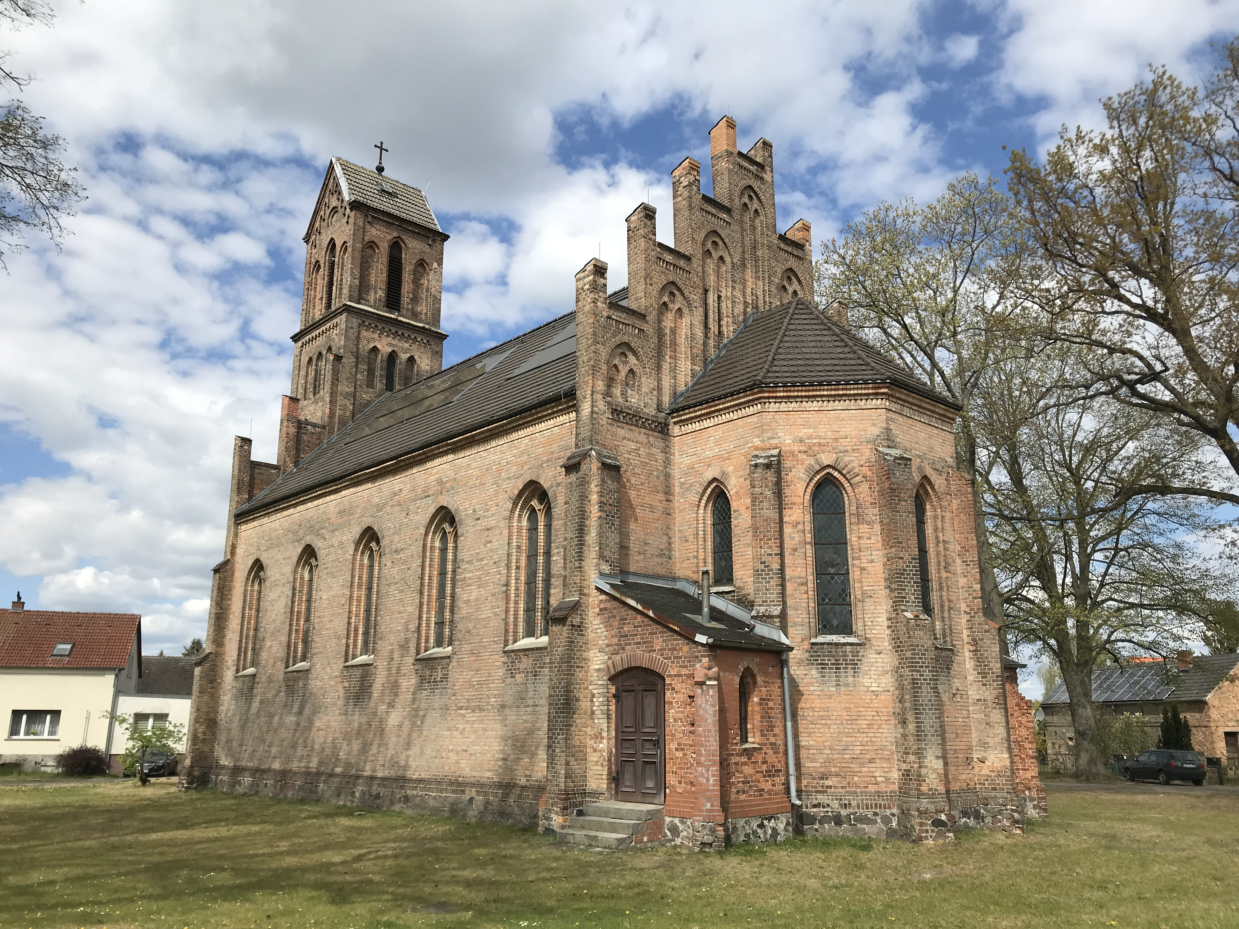 Die Dorfkirche Kablow ist eine neogotische Saalkirche in Kablow, einem Ortsteil der Stadt Königs Wusterhausen. Im Innern steht unter anderem ein Altar von 1516.